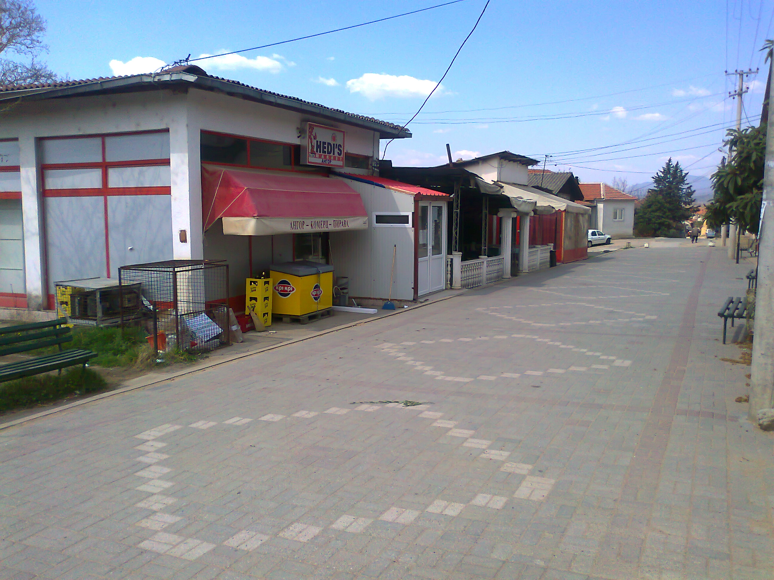 Pirava, Macedonia